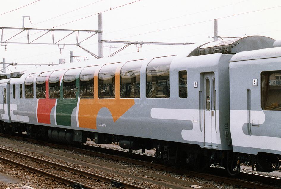 JR西日本 12系・14系和風客車「あすか」 4号車 オロ14 851